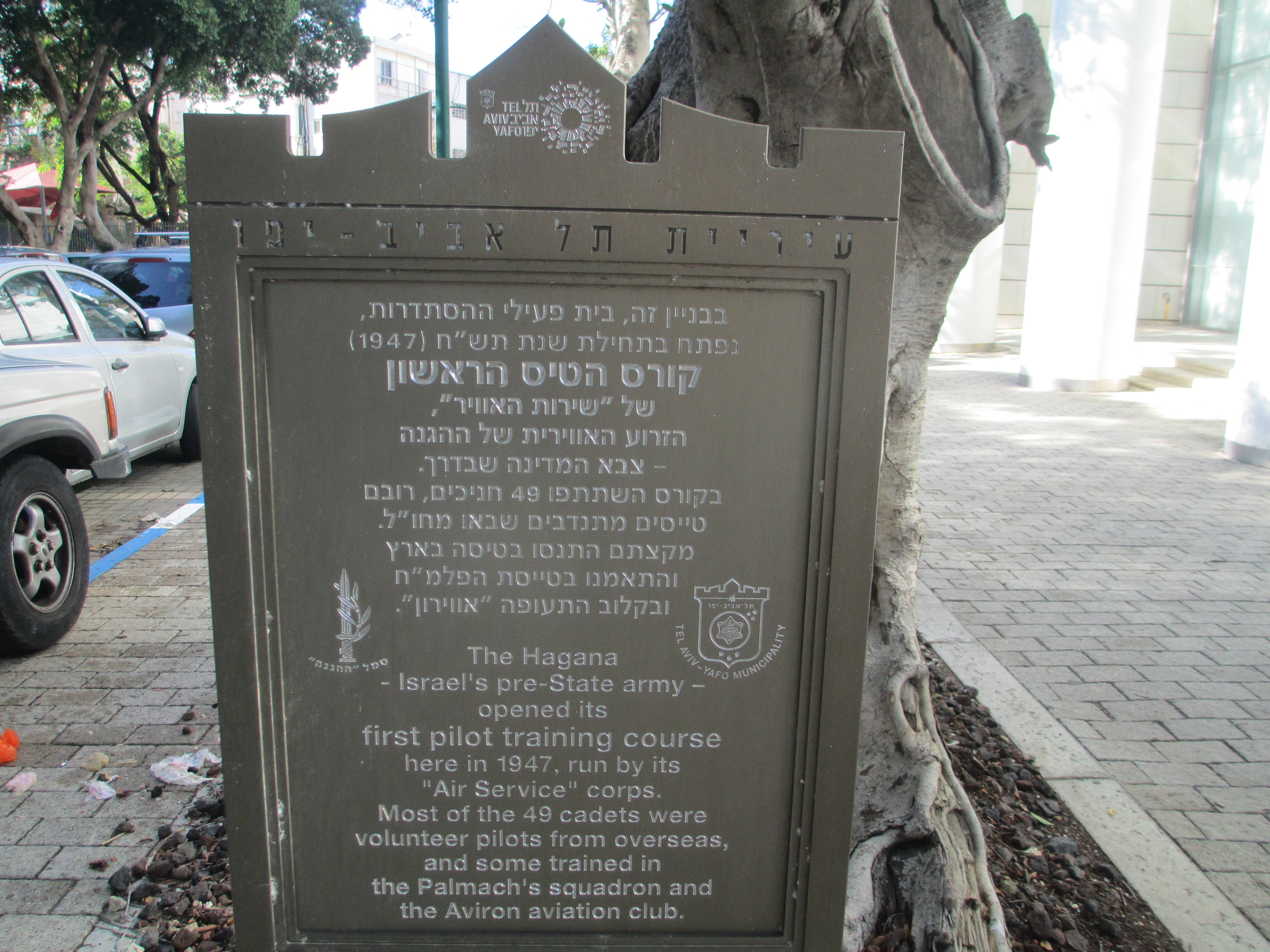 שלט הנצחה לקורס הראשון של שירות האוויר ברח' נהרדעא 5 בתל אביב